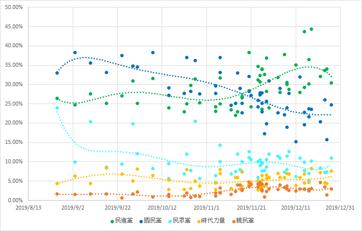 各媒體不分區立委政黨民調